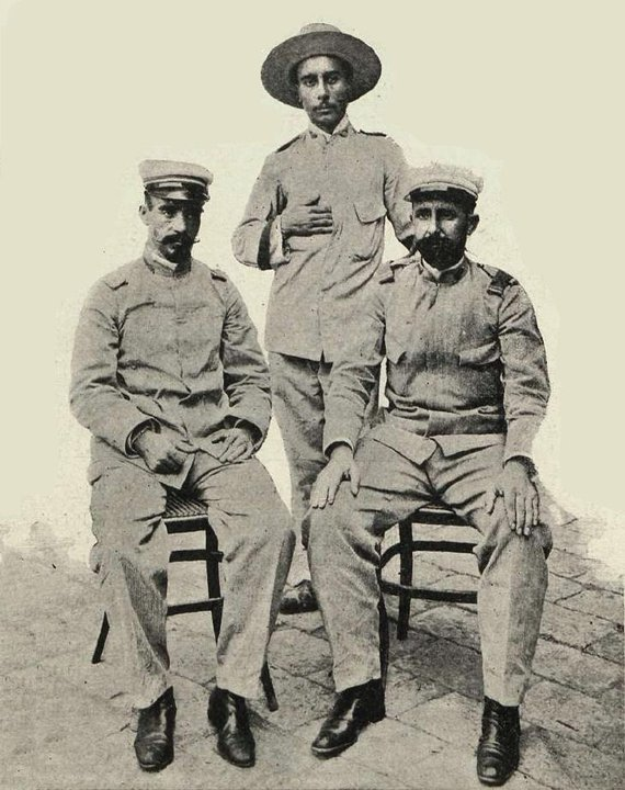 Algunos de los supervivientes del destacamento de Baler fotografiados el 2 de septiembre de 1899 en el patio del cuartel Jaime I de Barcelona (actualmente uno de los campus de la Universidad Pompeu Fabra) a su llegada a la península. Fotografía aparecida en el artículo "Los héroes de Baler", publicado en el número 19 de IRIS. Revista Semanal Ilustrada, de Barcelona. El pie de foto dice: El médico D. Rogelio Vigil de Quiñones. El segundo teniente D. Saturnino Martín Cerezo. El asistente del teniente.